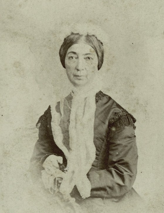 Елена Александровна Попова, ур. княжна Эристави (1808—1862), внучка грузинского царя Ираклия II.